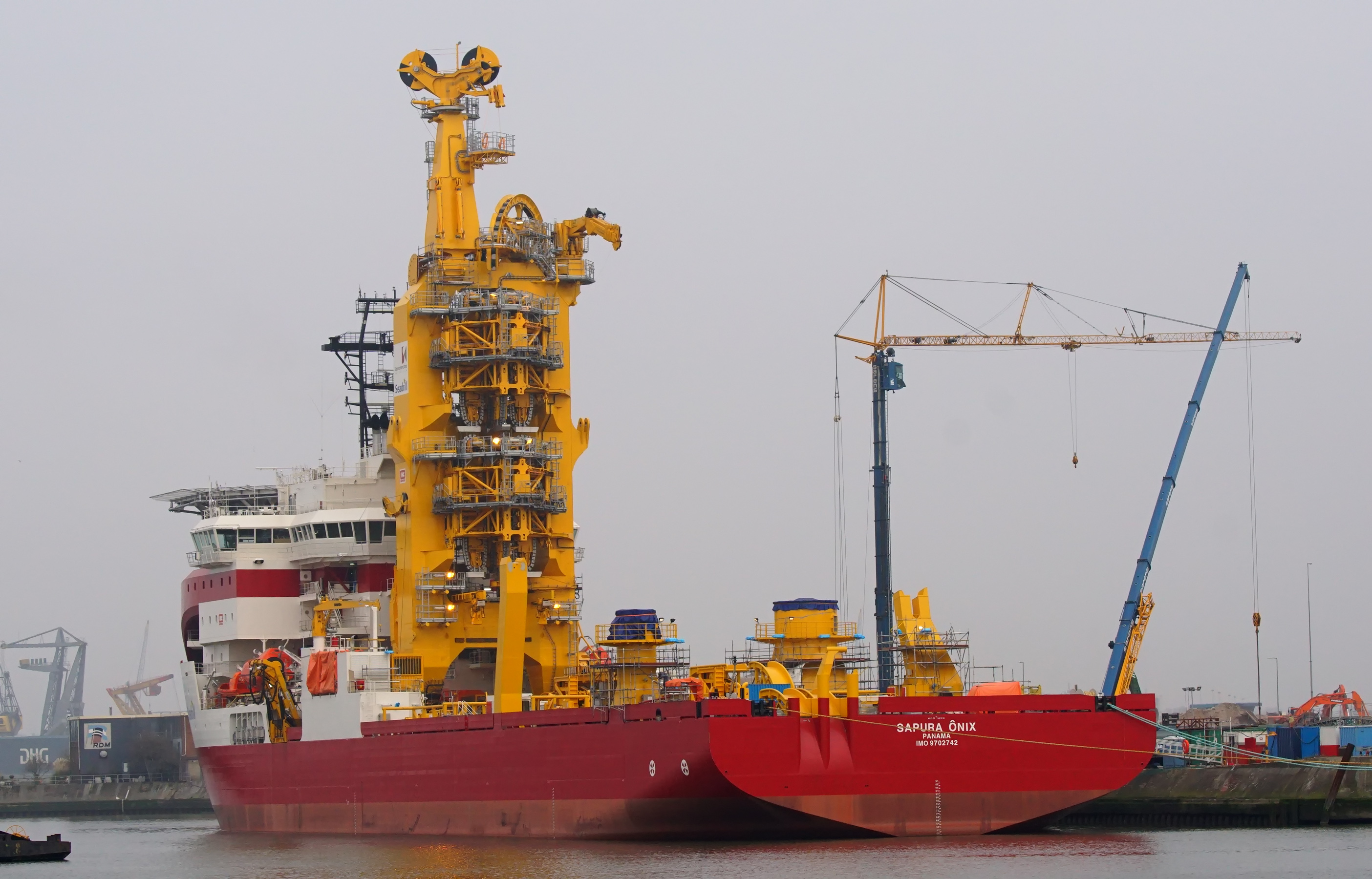 Heysehaven Heijplaat Rotterdam 20-11-2014